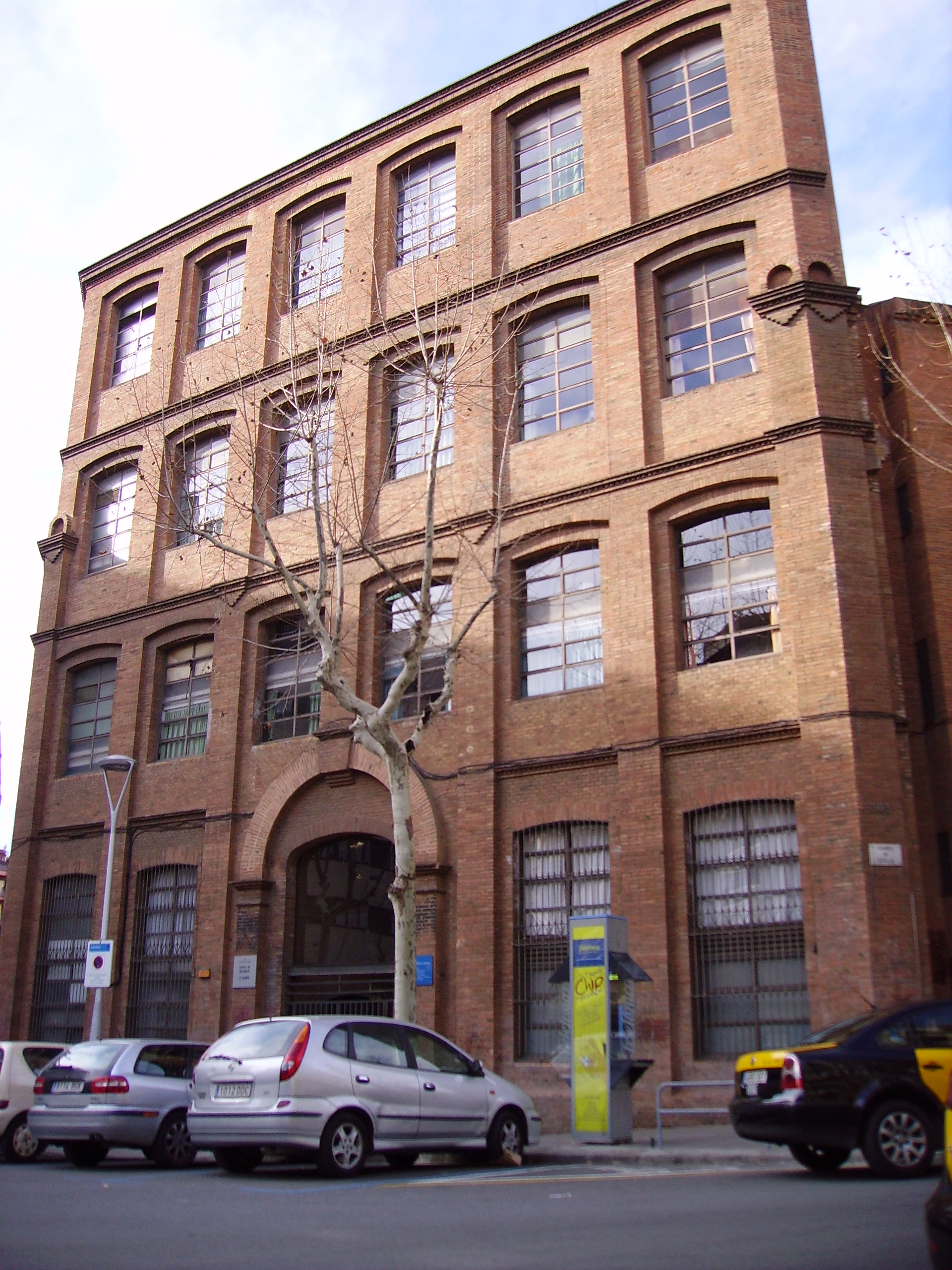 Façana de La Sedeta a la cruïlla dels carrer Indústria i Sicília, a Barcelona.